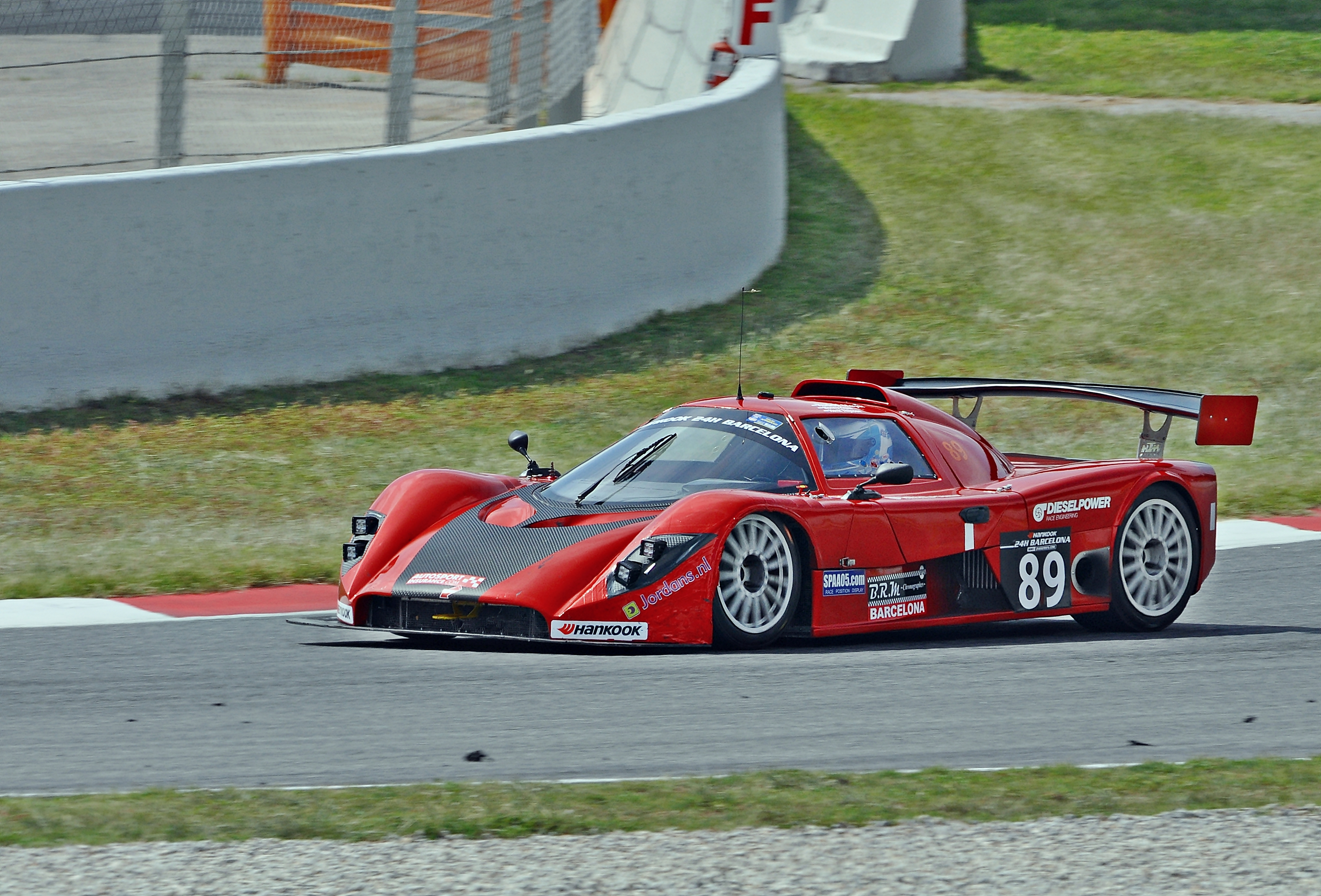 24 horas de Barcelona-circuito de Cataluña